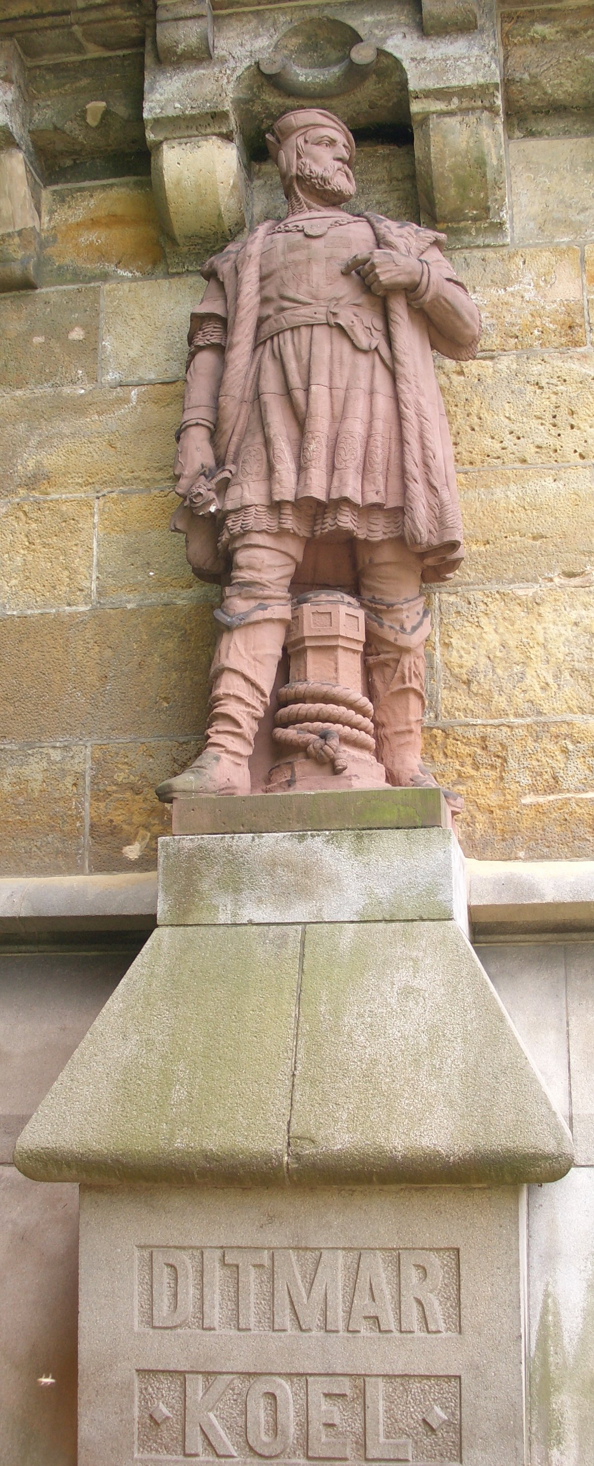 Ditmar Koel am Sockel der Kersten-MilesBrücke Seewartenstrasse in Hamburg (Landungsbrücken).